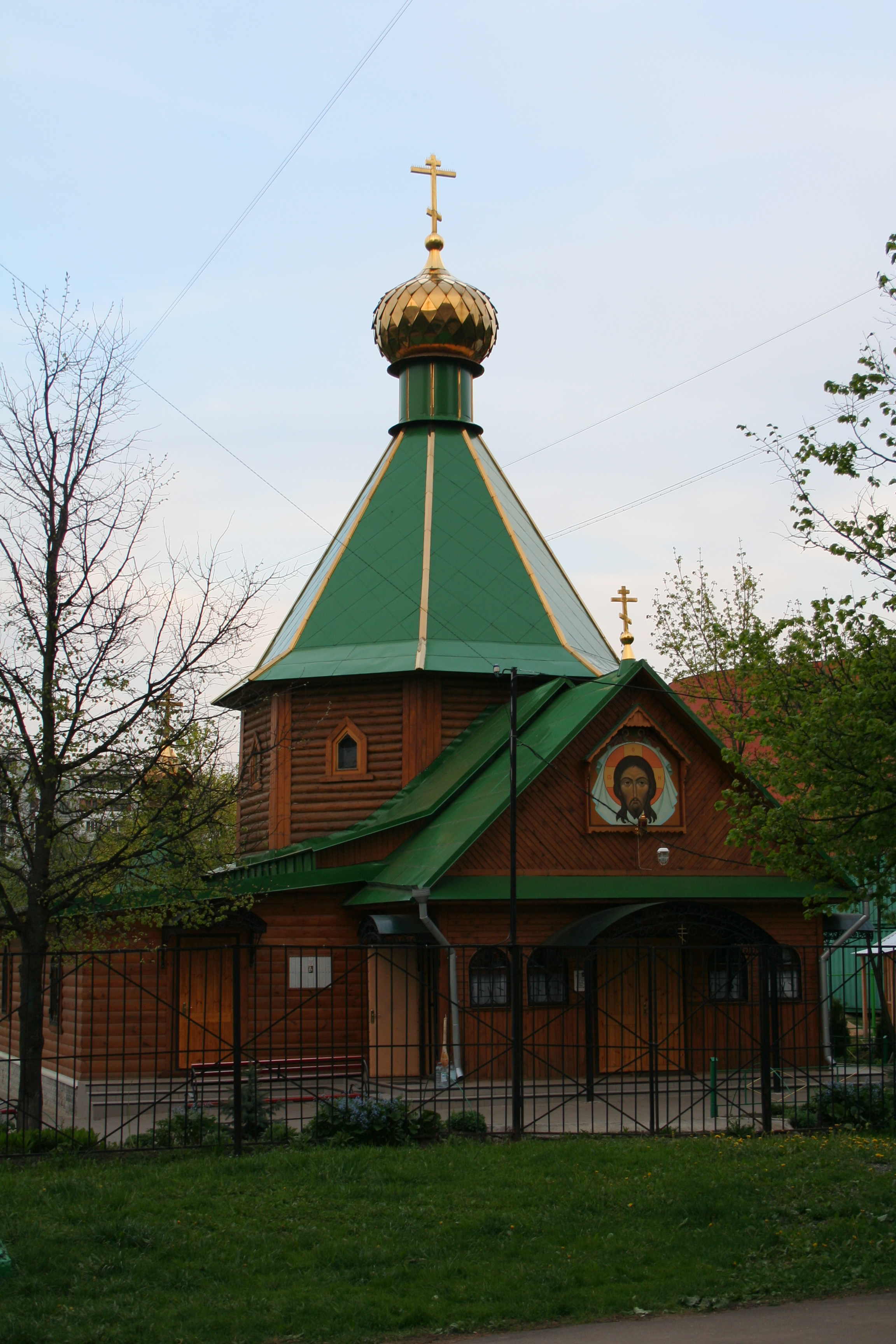 Kirche der Heiligen Dreifaltigkeit zu Tschertanowo in Moskau